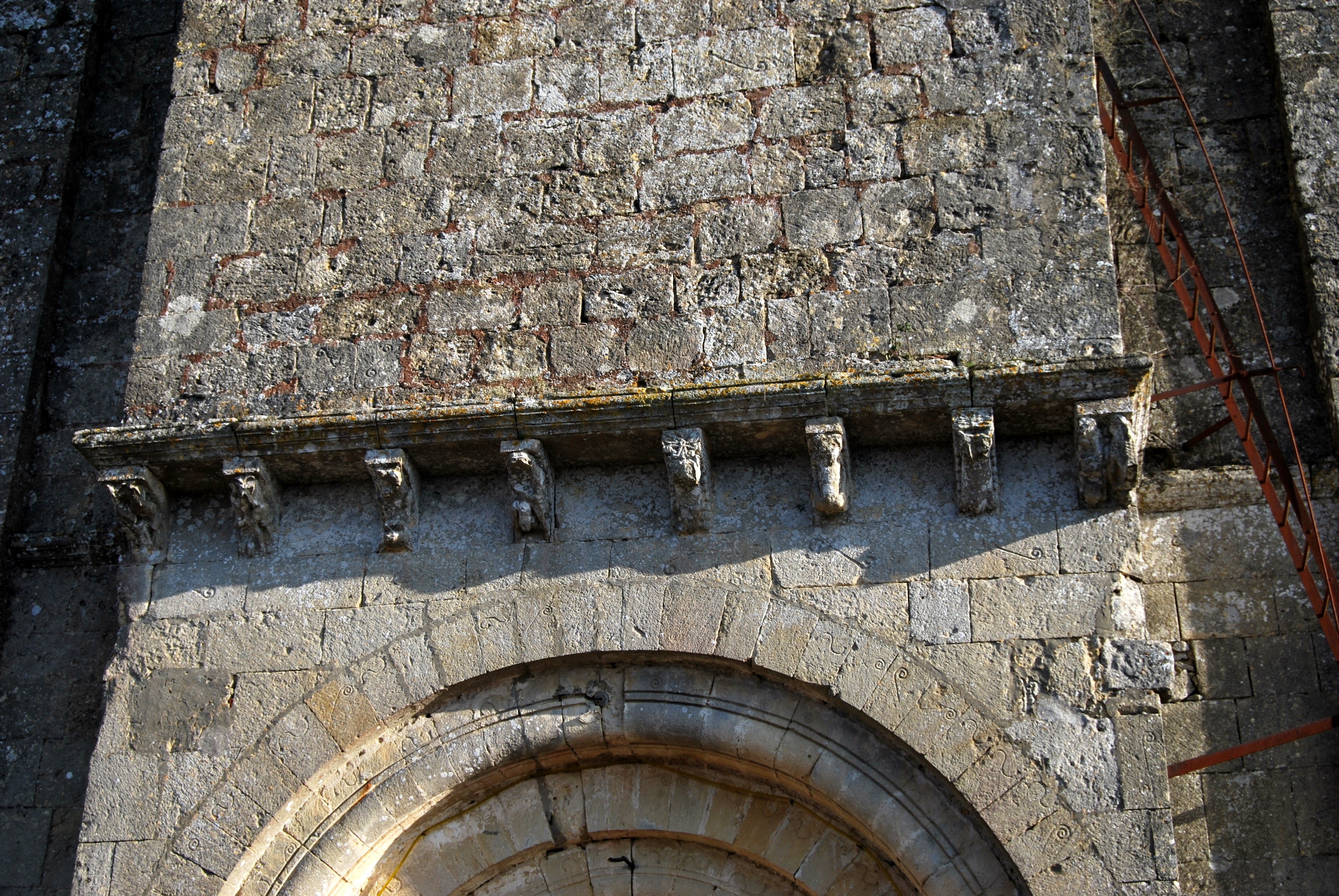 Eglise St Pierre de Mourens